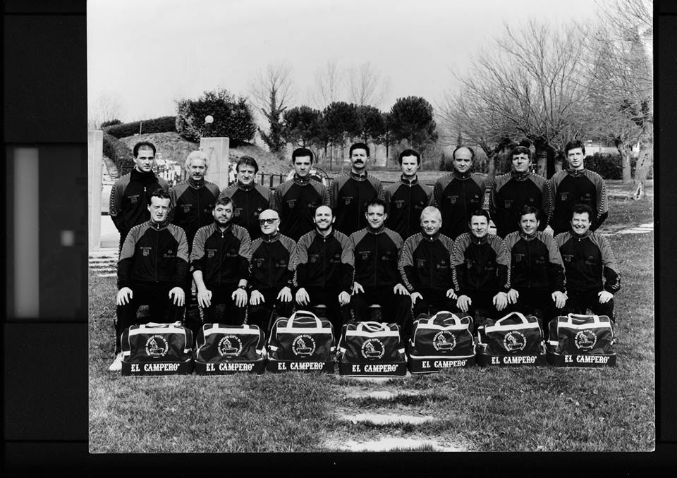 Prima squadra Master a Città di Castello